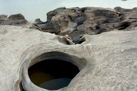 กุมภลักษณ์